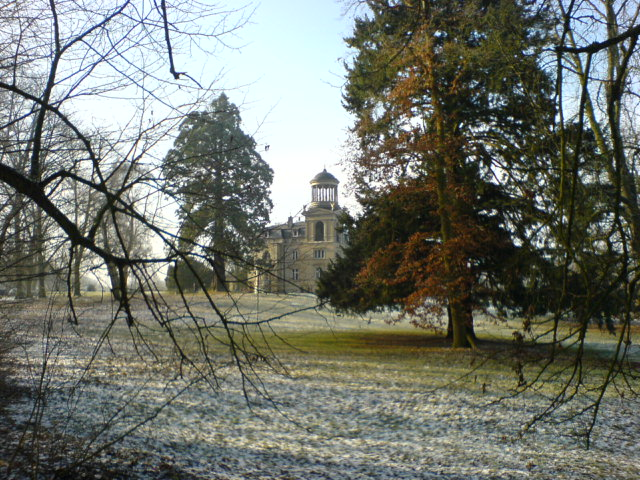 Schloss Kaarz, Park Sonstiges: ...